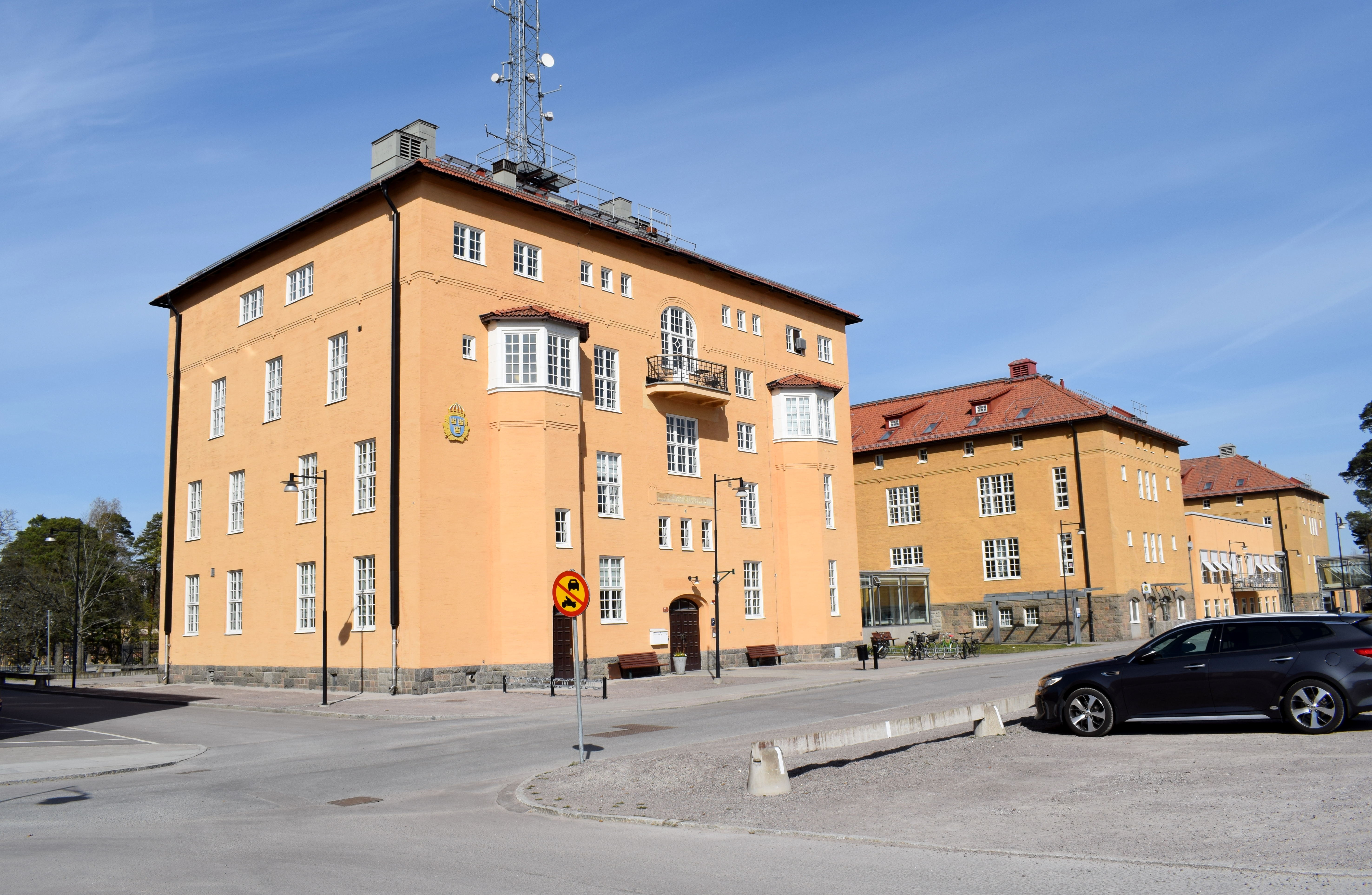 Kanslihuset vid östra delen av dubbelkasernetablissementet i Linköping. Kanslihuset uppfördes ursprungligen för Första livgrenadjärregementet 1922–1927. Åren 1928–1937 var staben för Östra brigadstaben lokaliserad till kanslihuset, åren 1938–1962 staben för Östgöta luftvärnsartilleriregemente, åren 1963–1997 staben för Svea artilleriregemente.